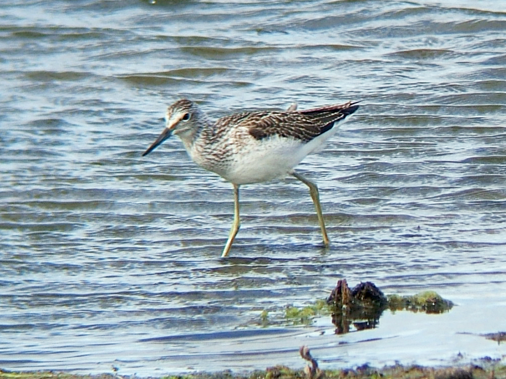 Tringa nebularia, Hauxley, Northumberland, UK